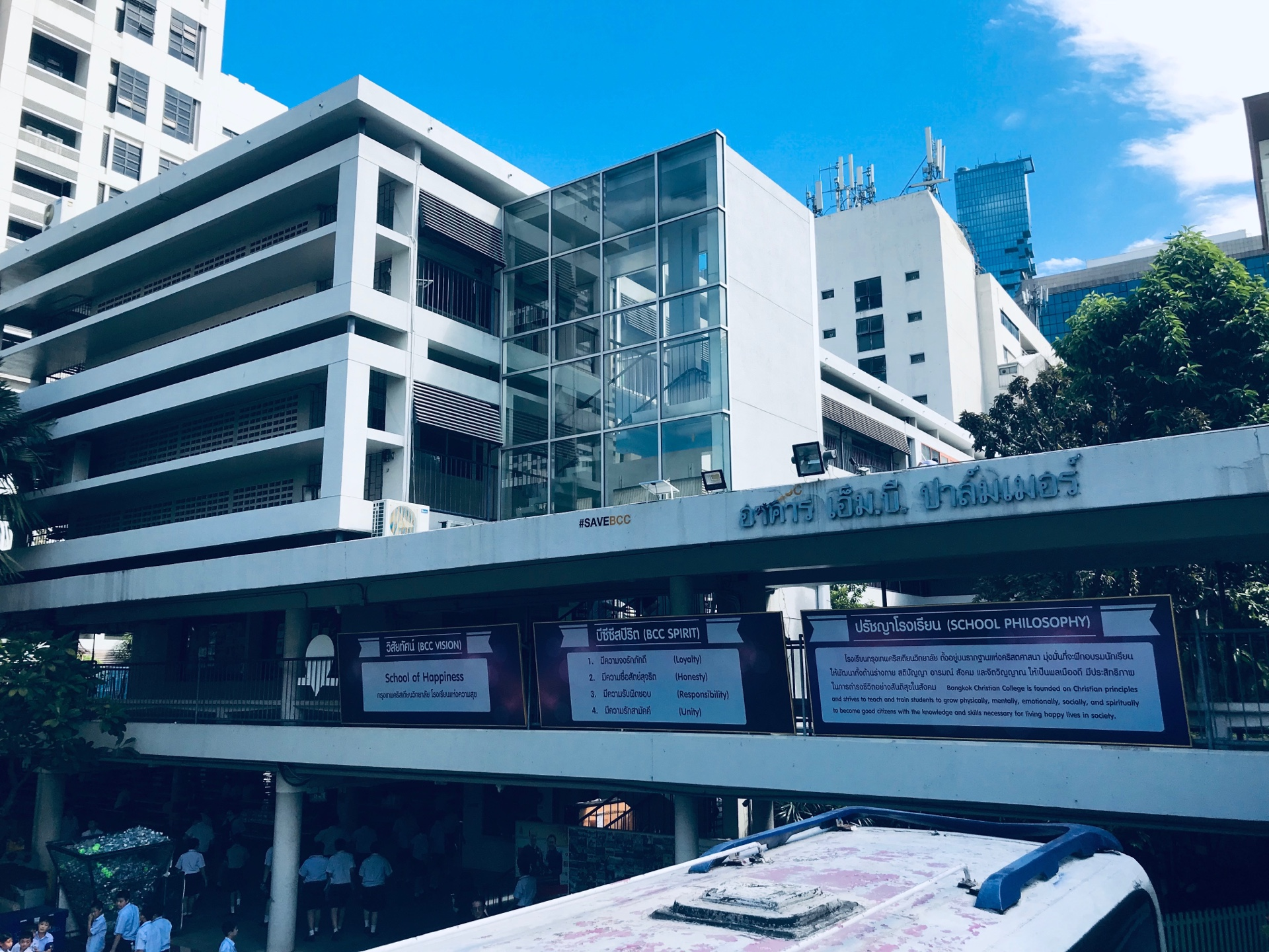 MB Palmer BCC 2019 อาคารเอ็มบี ปาล์มเมอร์ สูง 4 ชั้น จำนวน 3 อาคาร ตั้งอยู่กลางโรงเรียนกรุงเทพคริสเตียน ถ่ายเมื่อวันที่ 28 พฤศจิกายน 2562 วันเดียวกับที่มีการ SAVE BCC สำเร็จ